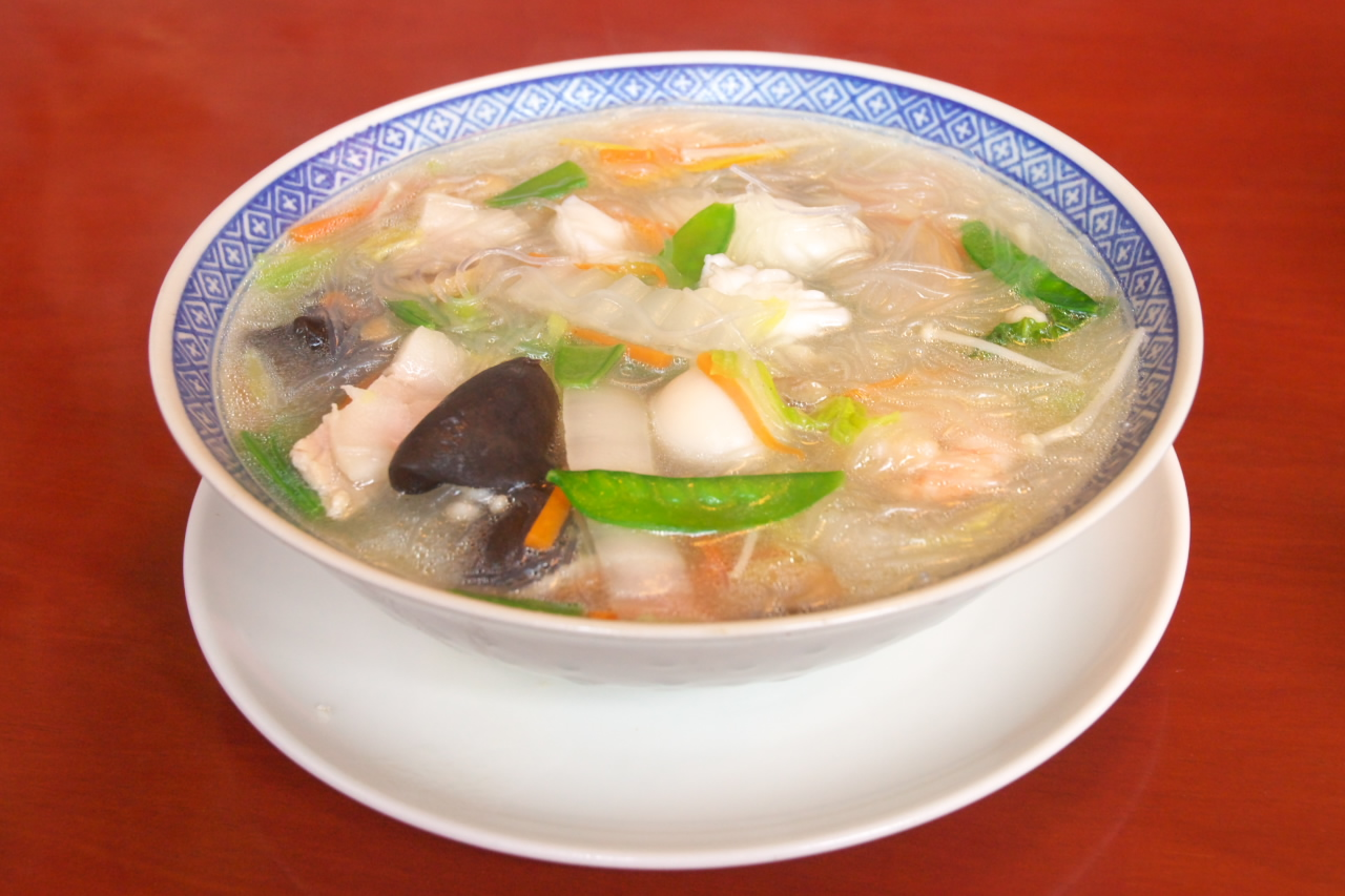 熊本名物の春雨スープ「太平燕」（熊本市健軍2-26-14、健軍校前駅最寄り、健軍神社そばの中華料理店「中国料理雲南」）「熊本名物の太平燕（タイピーエン、または、タイピンエン）。おおざっぱに言えばチャンポンの麺を春雨にしたものとも言えるが、この太平燕のスープはチャンポンぽくはない。熊本ではごく普通にどこでも食べることができるそうだが、熊本以外ではあまり見かけない。ただし、最近は熊本以外でも太平燕を出す店も増えている。ちなみに、これは健軍の雲南という店のもの。」MAP by ALPSLABTai Pin En / 太平燕